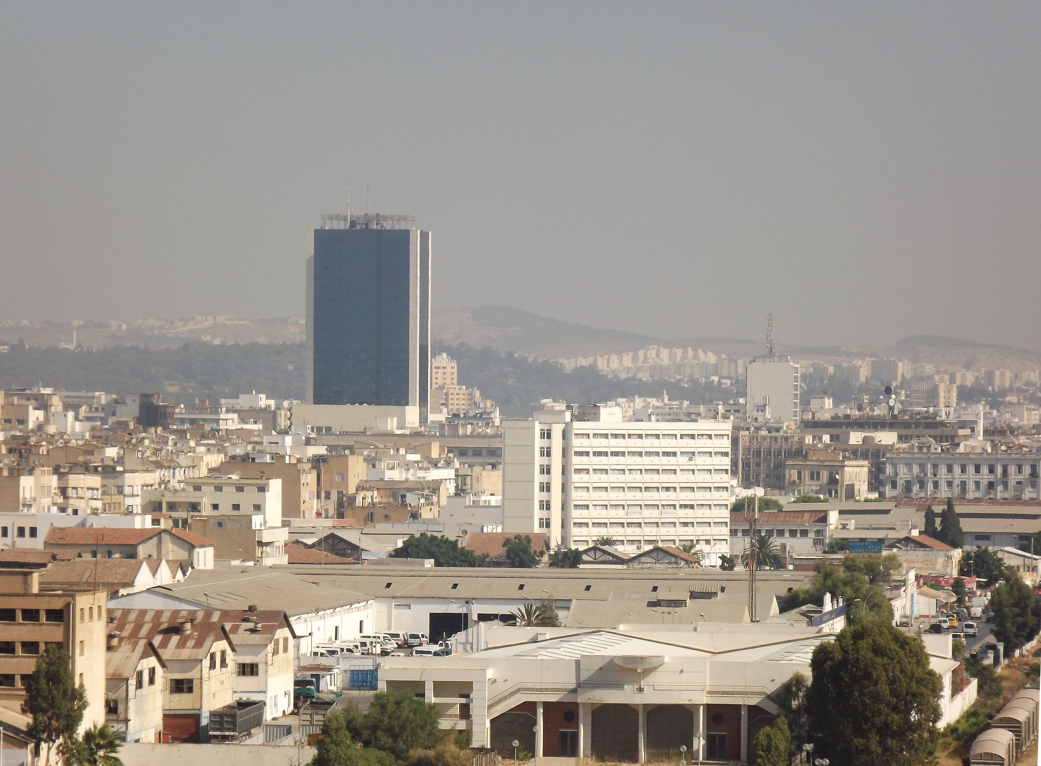 Panorama de Tunis (vue de sidi belhassen)